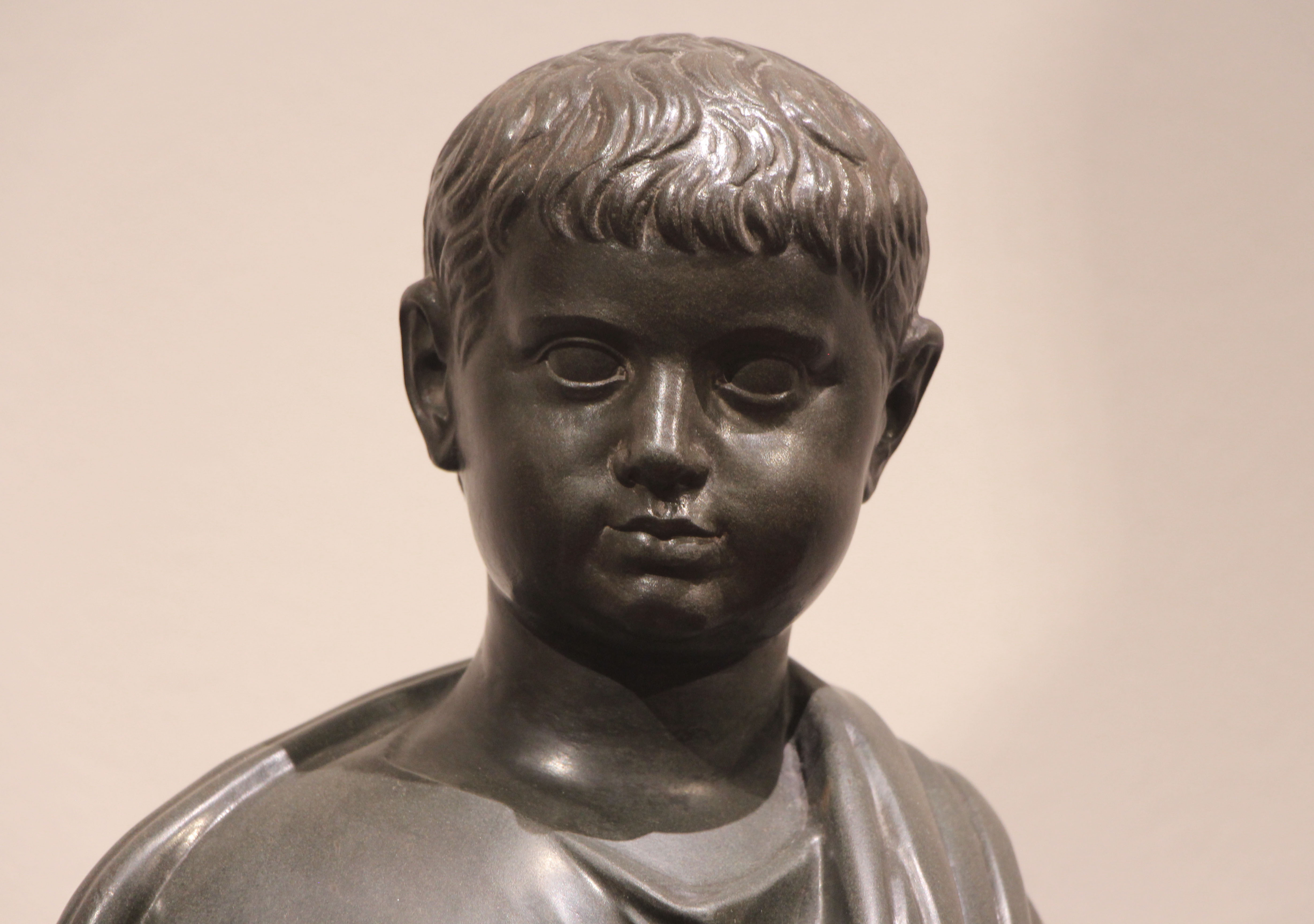 Statue d'un enfant en toge : Britannicus ?, découverte à Rome, sur le Célius en 1651.